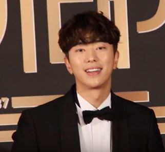 2017년 마지막 날인 12월 31일 오후 서울 영등포 여의도 KBS홀 야외광장에서 '2017 KBS 연기대상' 레드카펫 행사가 열렸다.